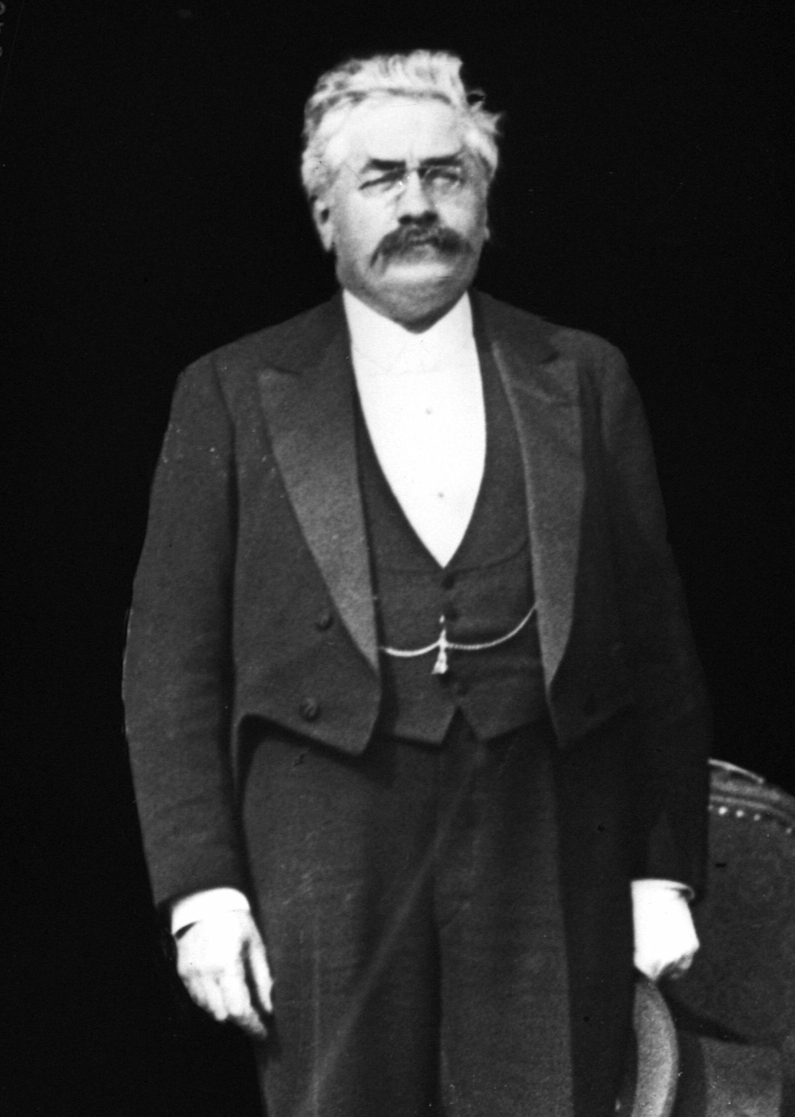 Alexandre Millerand, ministre de la Guerre français.